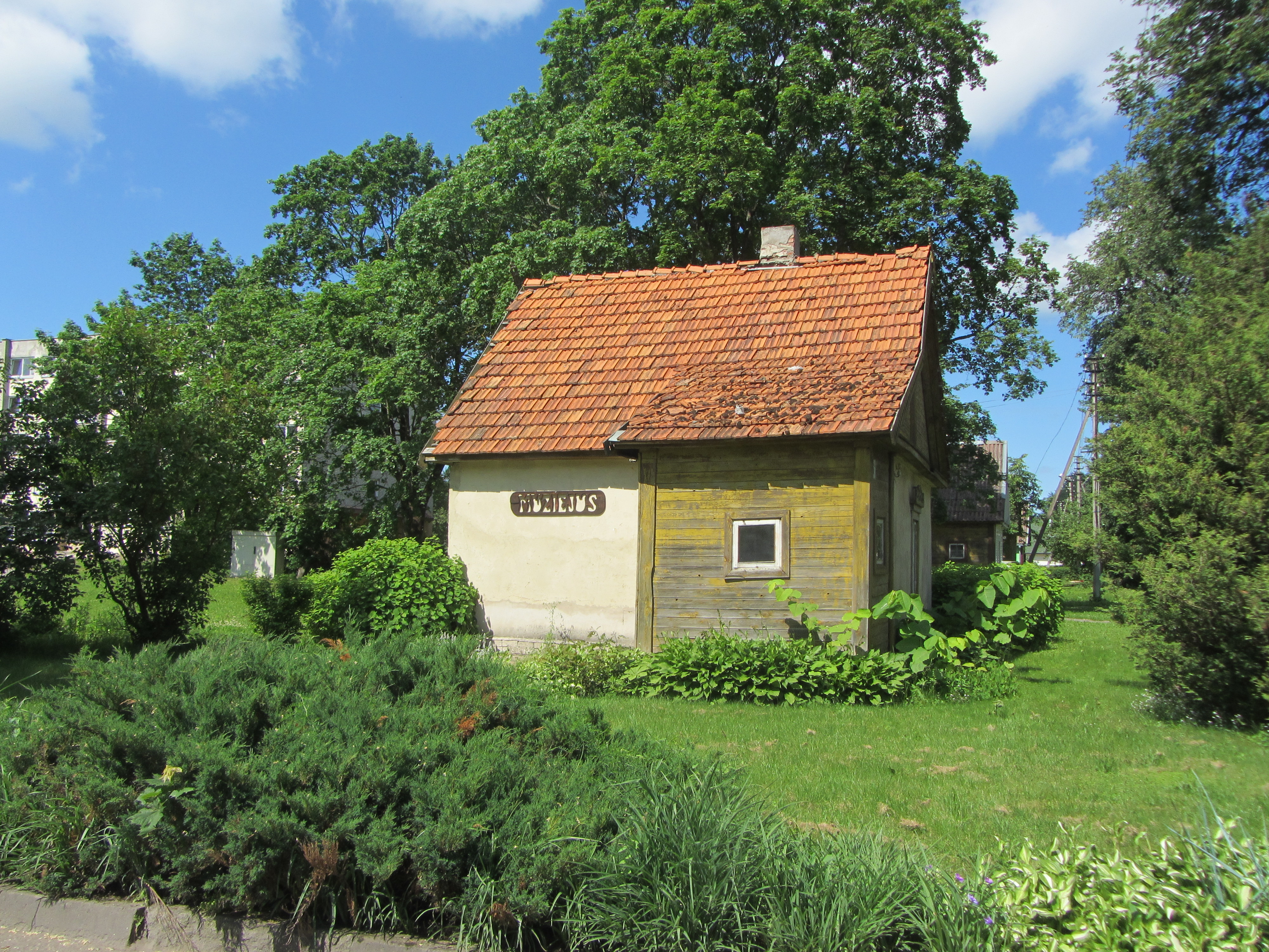 Avižieniai, Lithuania